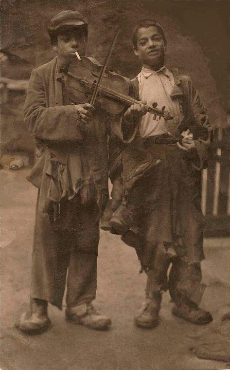 Deti pomáhali rodine získavať peniaze príležitostným hraním.